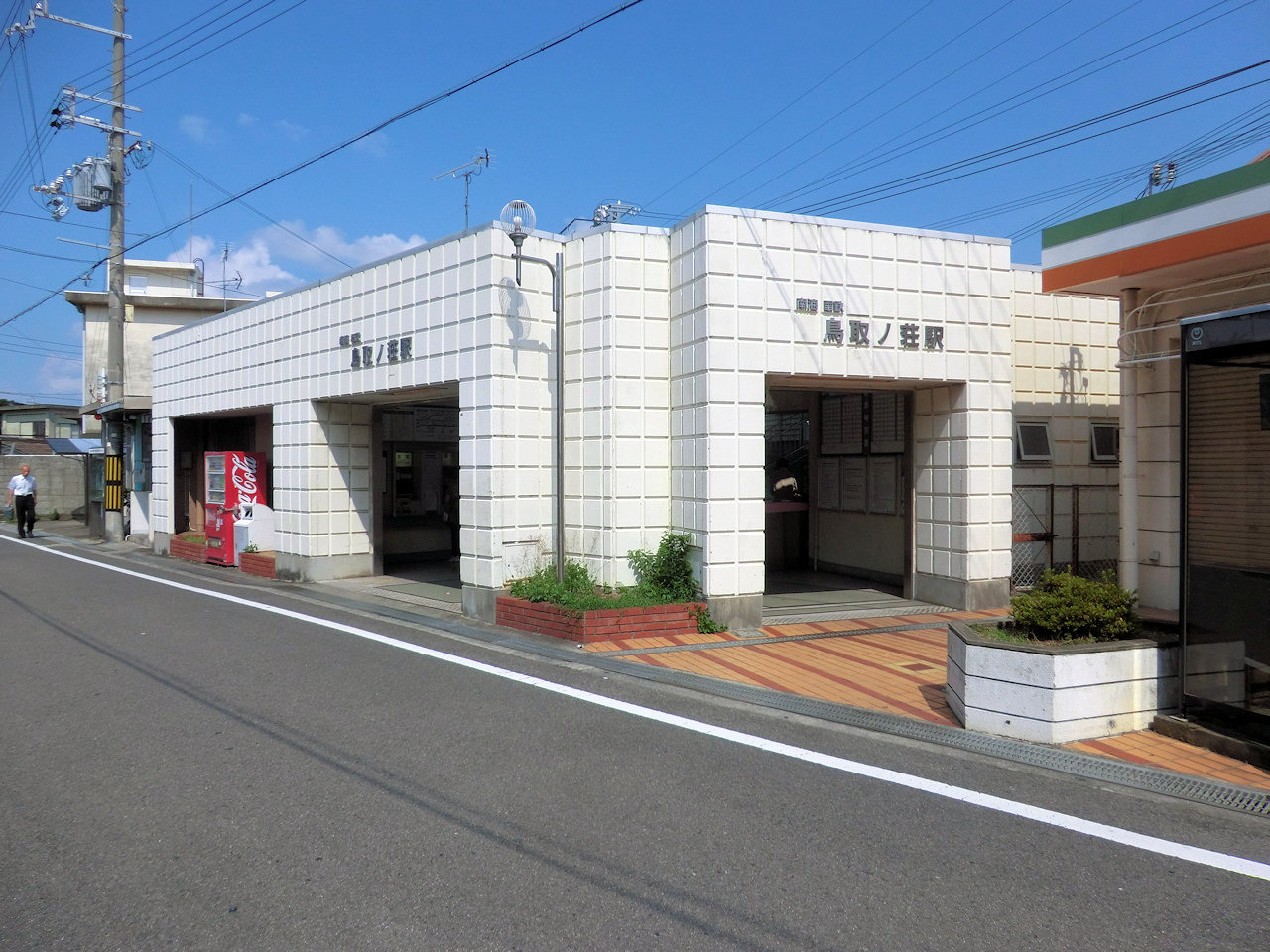 鳥取ノ荘駅